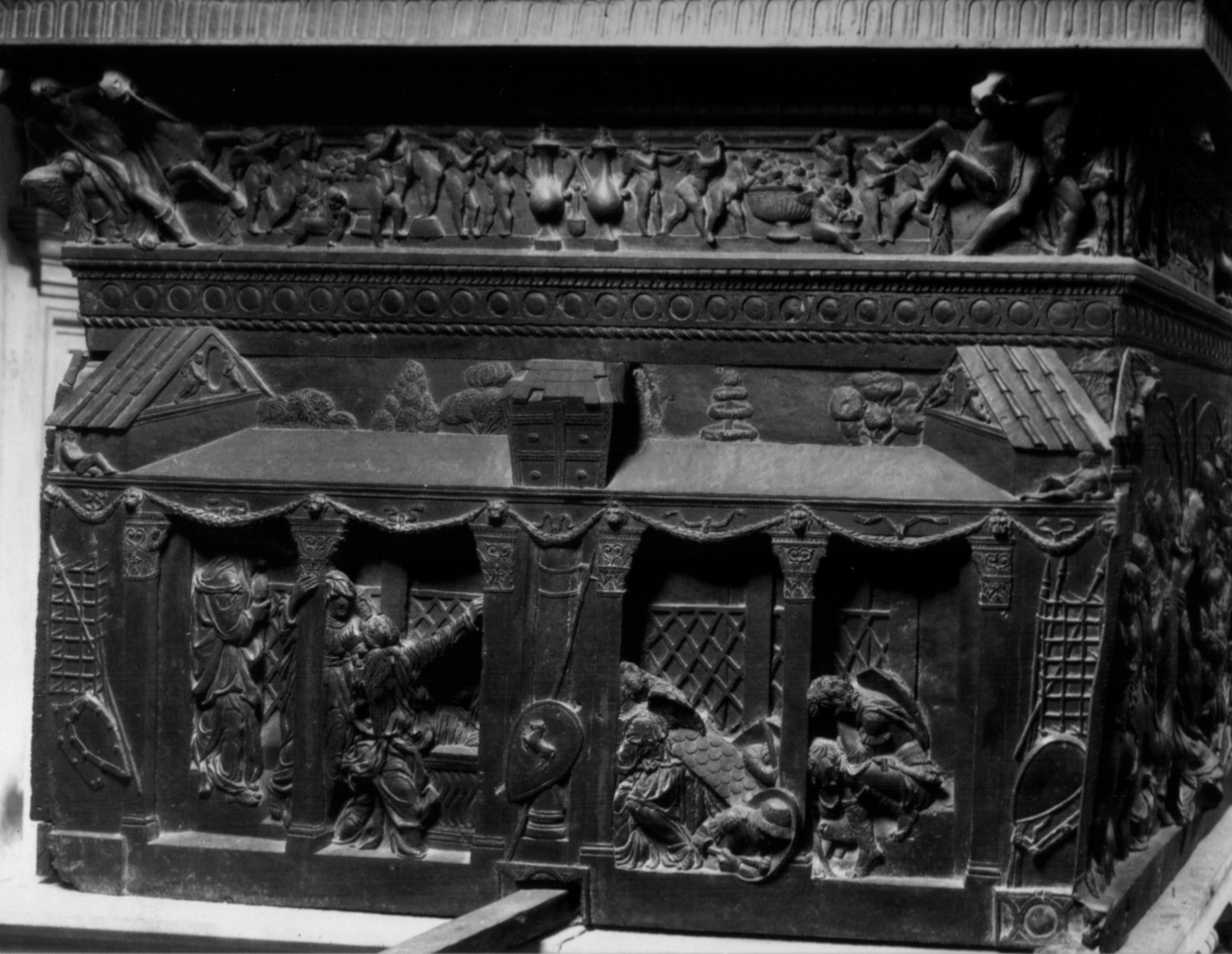 Il Pulpito della Resurrezione, in San Lorenzo a Firenze, opera di Donatello (1460s). Dettaglio: Le Pie donne al Sepolcro. Fotografia Alinari, 1852.